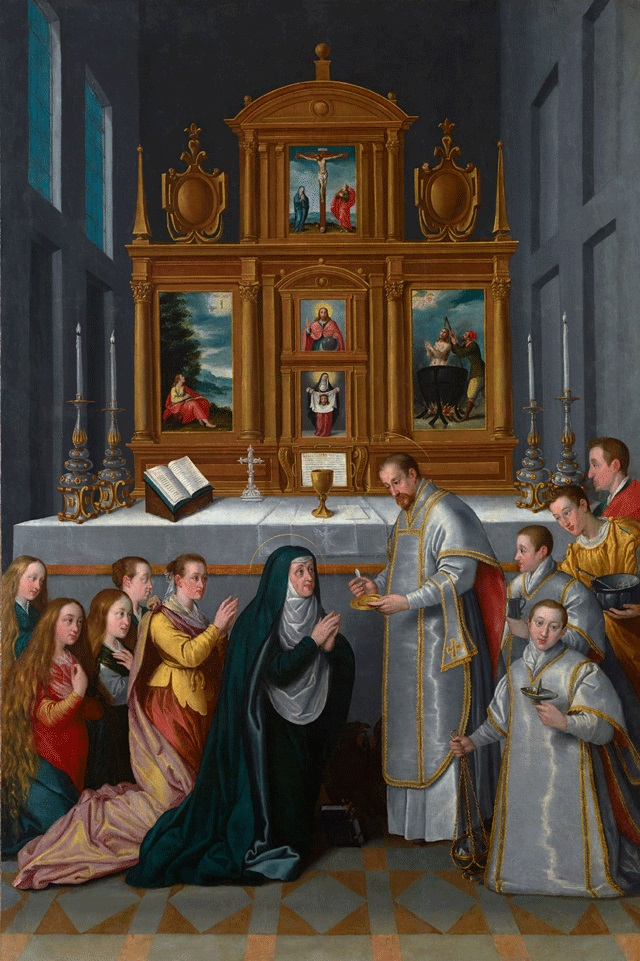 La obra representa a la familia de Carlos II de Estiria (1540-1590), que fue archiduque de Austria y duque de Estiria, de Carintia y de Carniola, y de su esposa, la duquesa María Ana de Baviera. En el reverso del cuadro constan los nombres de todos los personajes representados, y de ese modo queda corroborado que aparecen: El emperador Fernando II de Habsburgo (1578-1637); Maximiliano Ernesto de Habsburgo (1583-1616), con túnica amarilla y sosteniendo acetre e hisopo; Carlos de Habsburgo (1590-1624), que fue obispo de Bratislava, sostiene un jarro y viste dalmática por su condición de diácono de la misa; Leopoldo V de Habsburgo, futuro obispo de Passau y conde del Tirol, aparece con incensario y naveta y arrodillado frente al espectador. Detrás de la archiduquesa María Ana de Baviera, que aparece representada como la Virgen María y recibiendo la comunión de manos de San Juan Evangelista, aparecen: María Ana de Habsburgo (1573-1598), efímera esposa de Segismundo III de Polonia; María Cristina de Habsburgo (1574-1621), esposa de Segismundo Báthory, príncipe de Transilvania. Leonor de Habsburgo (1582-1620); Constanza de Habsburgo (1588-1631), segunda esposa del rey Segismundo III de Polonia; María Magdalena de Austria (1589-1631), gran duquesa de Toscana por su matrimonio con Cosme II de Médici.